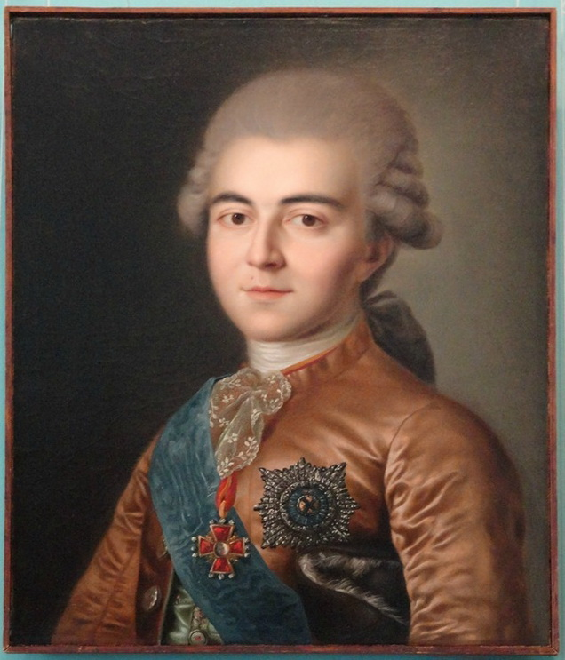 "Портрет А.Г. Разумовского" (?). Дмитровский музей.